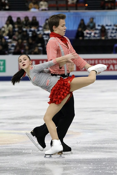 Аполлинария Панфилова / Дмитрий Рылов (Россия) на финале юниорского Гран-при 2017-2018